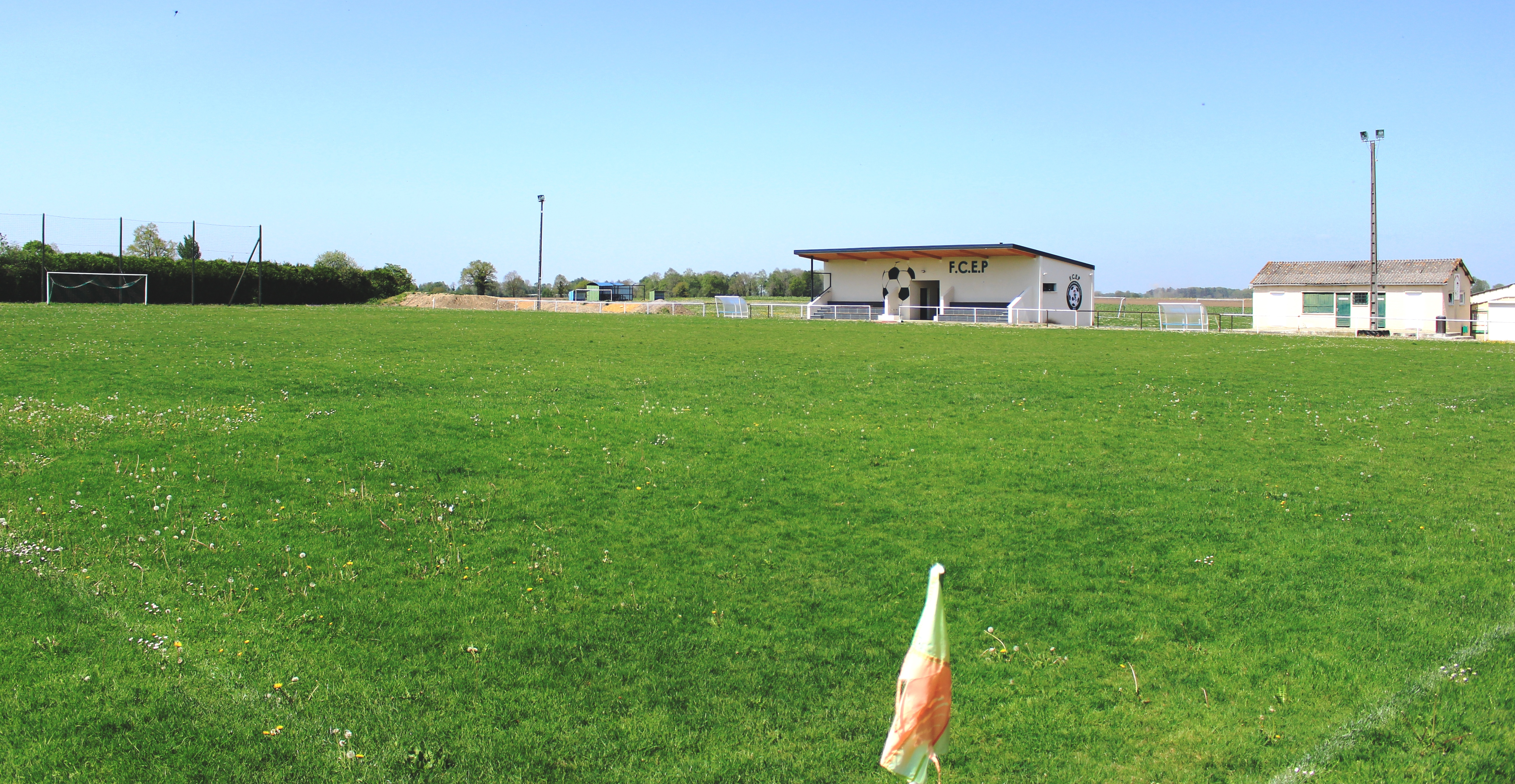 Stade de football de Luquet (Hautes-Pyrénées)